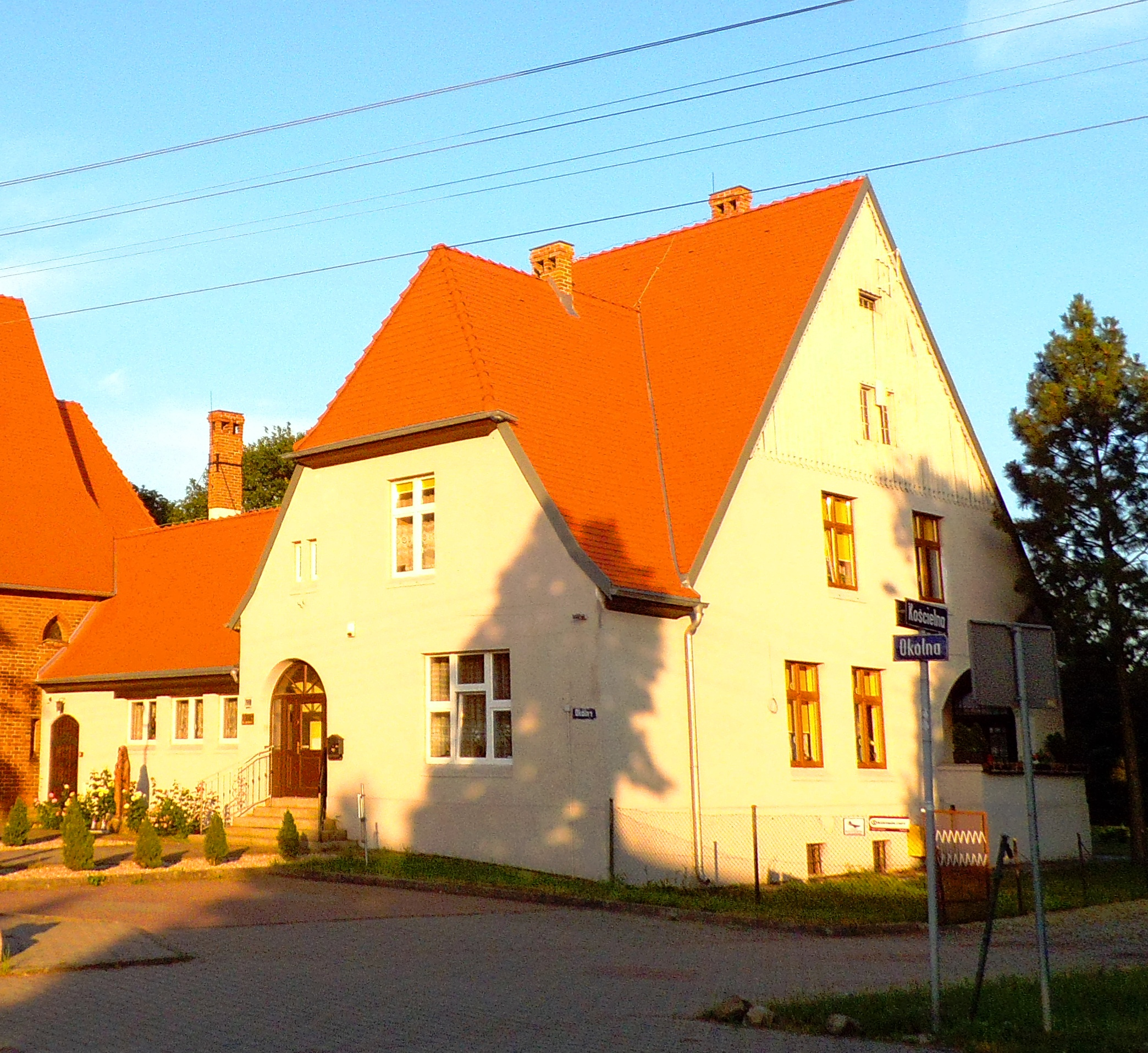 Kościół Opatrzości Bożej w Toruniu. plebania